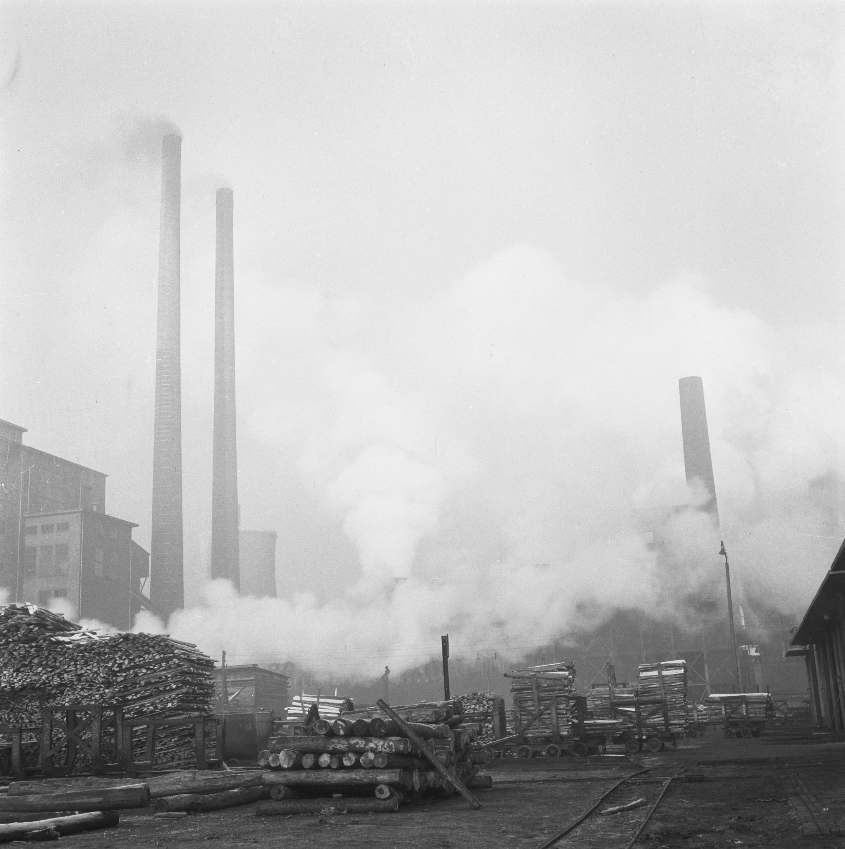 Collectie / Archief : Fotocollectie Anefo Reportage / Serie : Kolenmijnen Limburg Beschrijving : Kolenmijnen Limburg Datum : 21 november 1945 Locatie : Limburg Trefwoorden : mijnbouw, mijnen Fotograaf : Blazer, Carel / Anefo Auteursrechthebbende : Nationaal Archief Materiaalsoort : Negatief (zwart/wit) Nummer archiefinventaris : bekijk toegang 2.24.01.03 Bestanddeelnummer : 901-1013